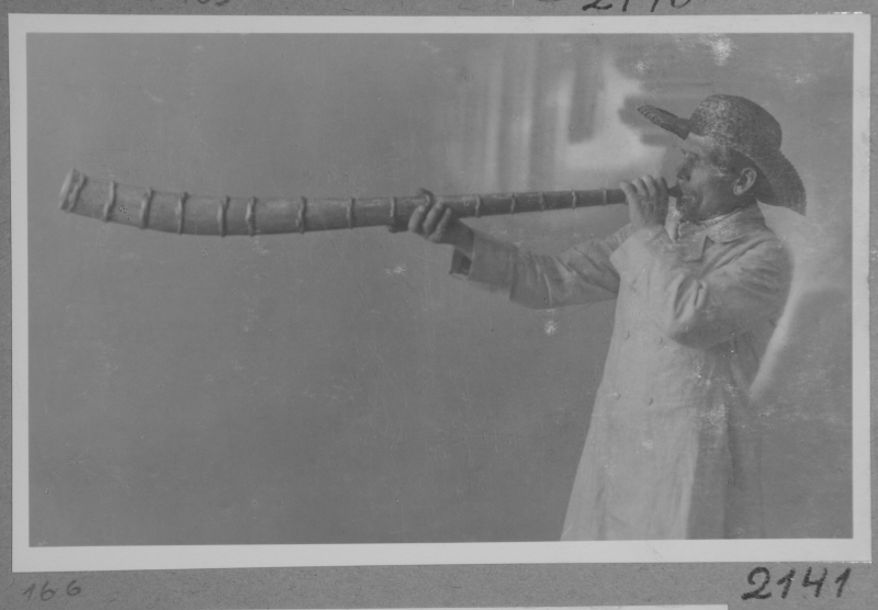 Karjapasunamängija